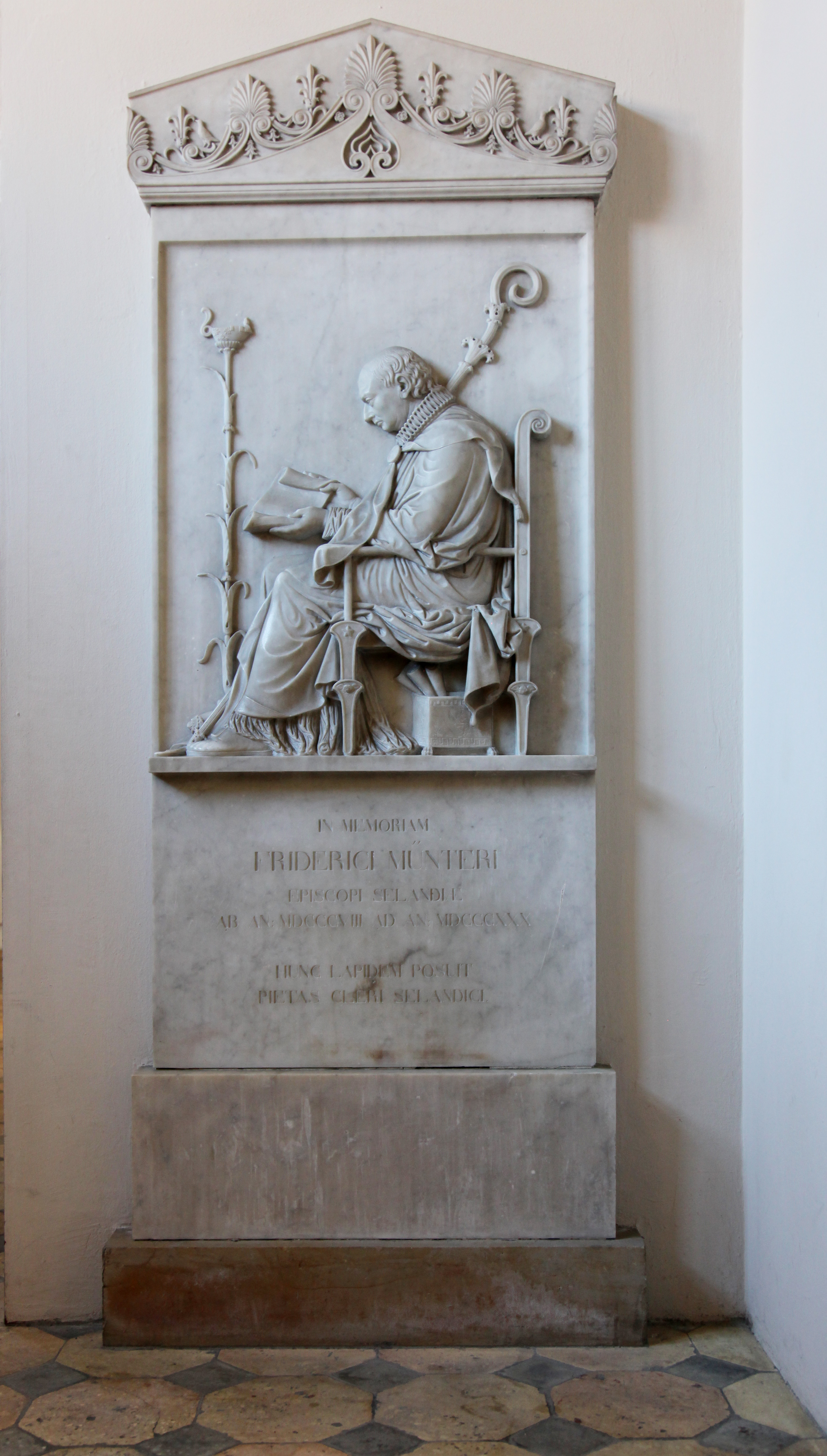 Biskop Münters stele fra Vor Frue Kirke